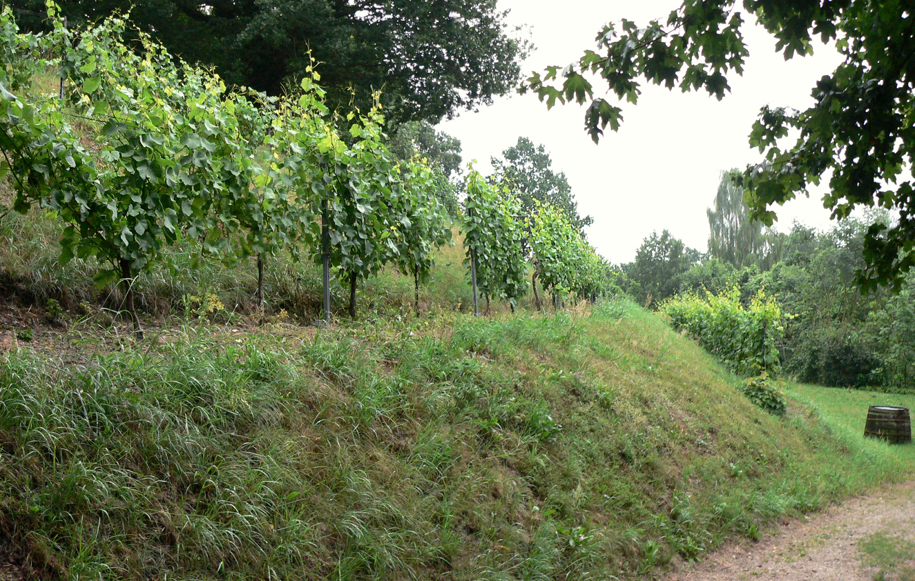 Weinberg oberhalb Hitzacker mit Weinreben